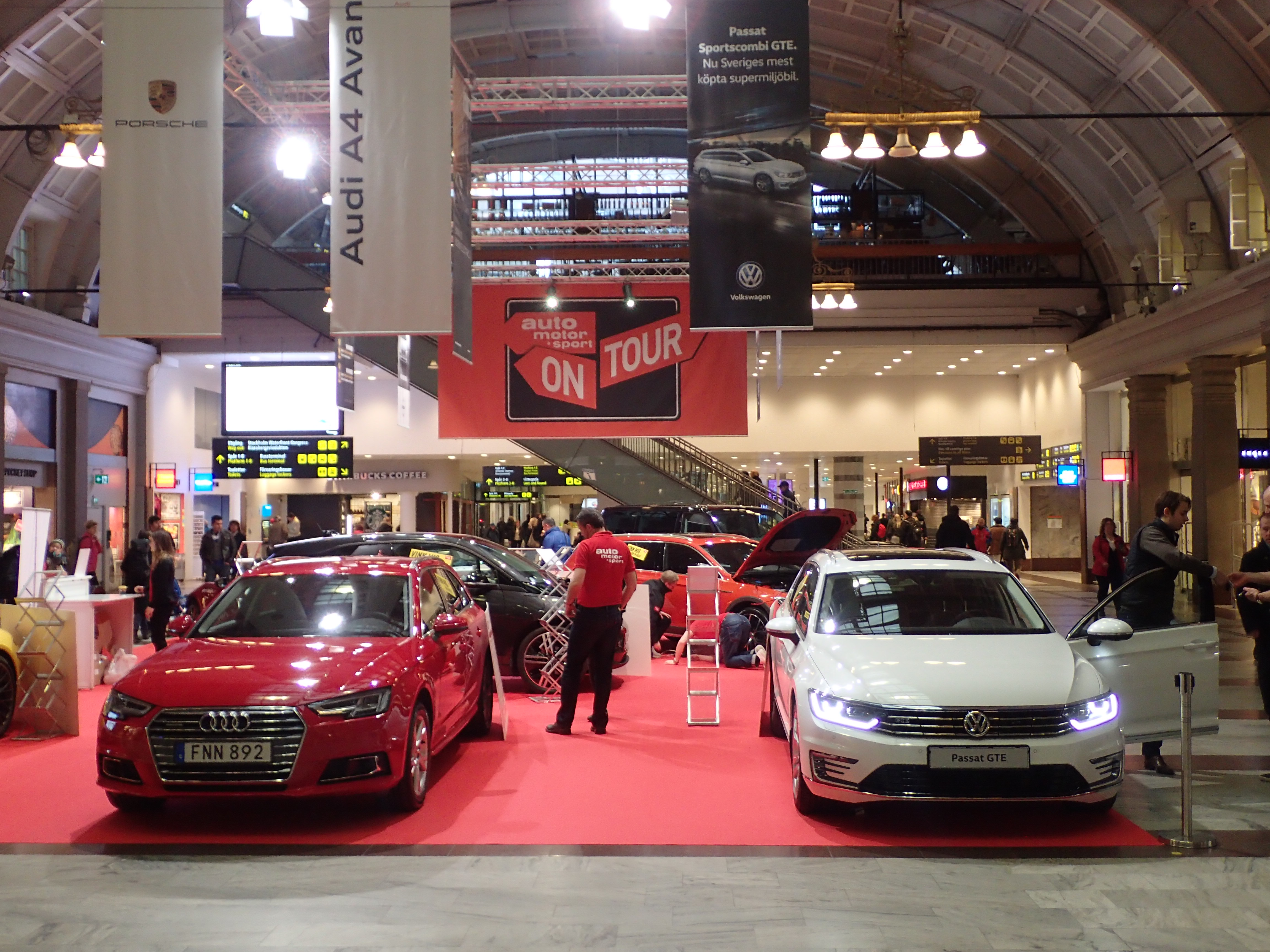 Auto motor sport on tour på Stockholms Centralstarion